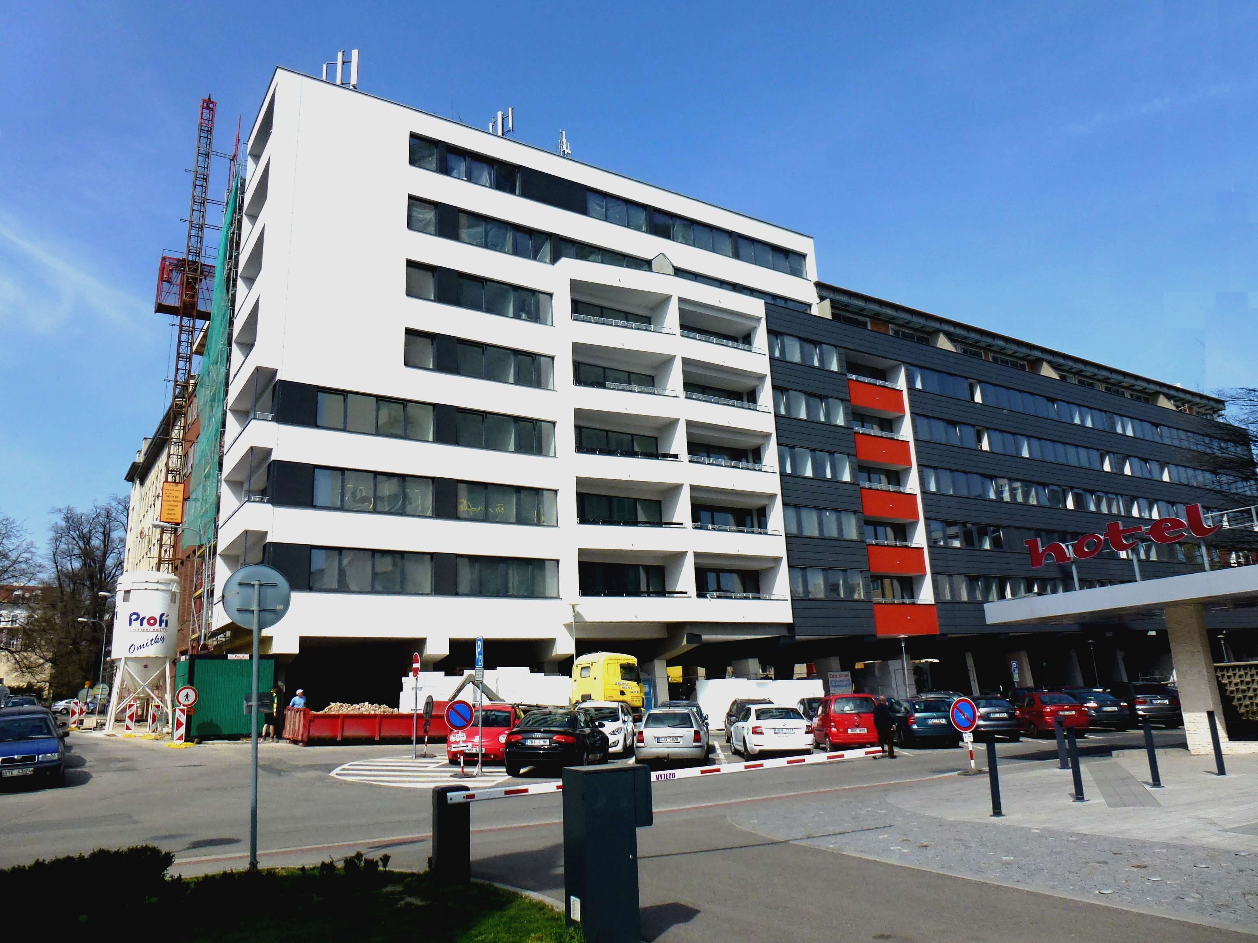 Budova ve které sídlí Vysoká škola Karla Engliše, a.s.